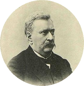 Alfons Parczewski